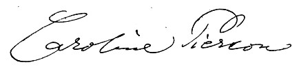 Signatur der deutschen Schriftstellerin Caroline Pierson